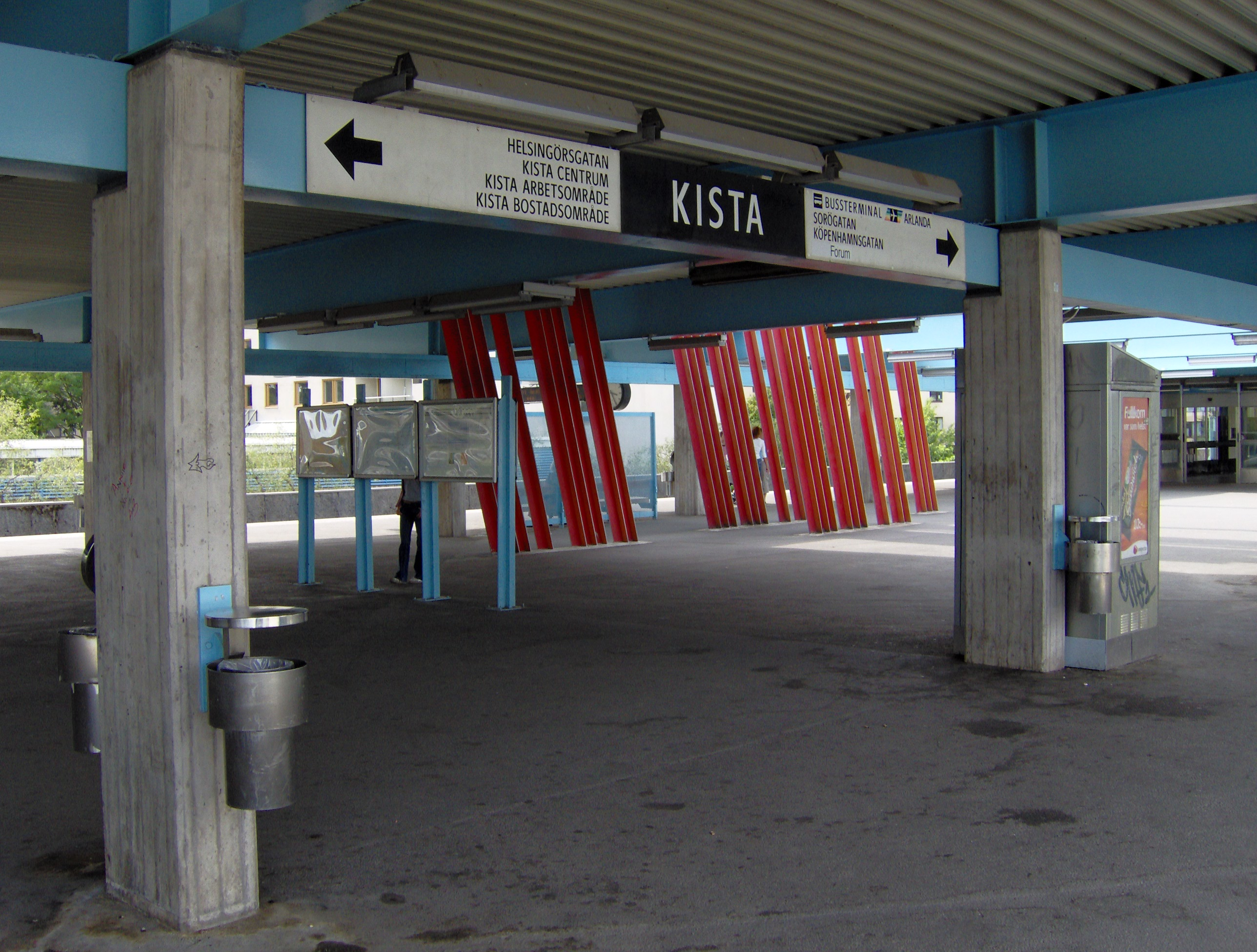 Stockholm metro station Kista.